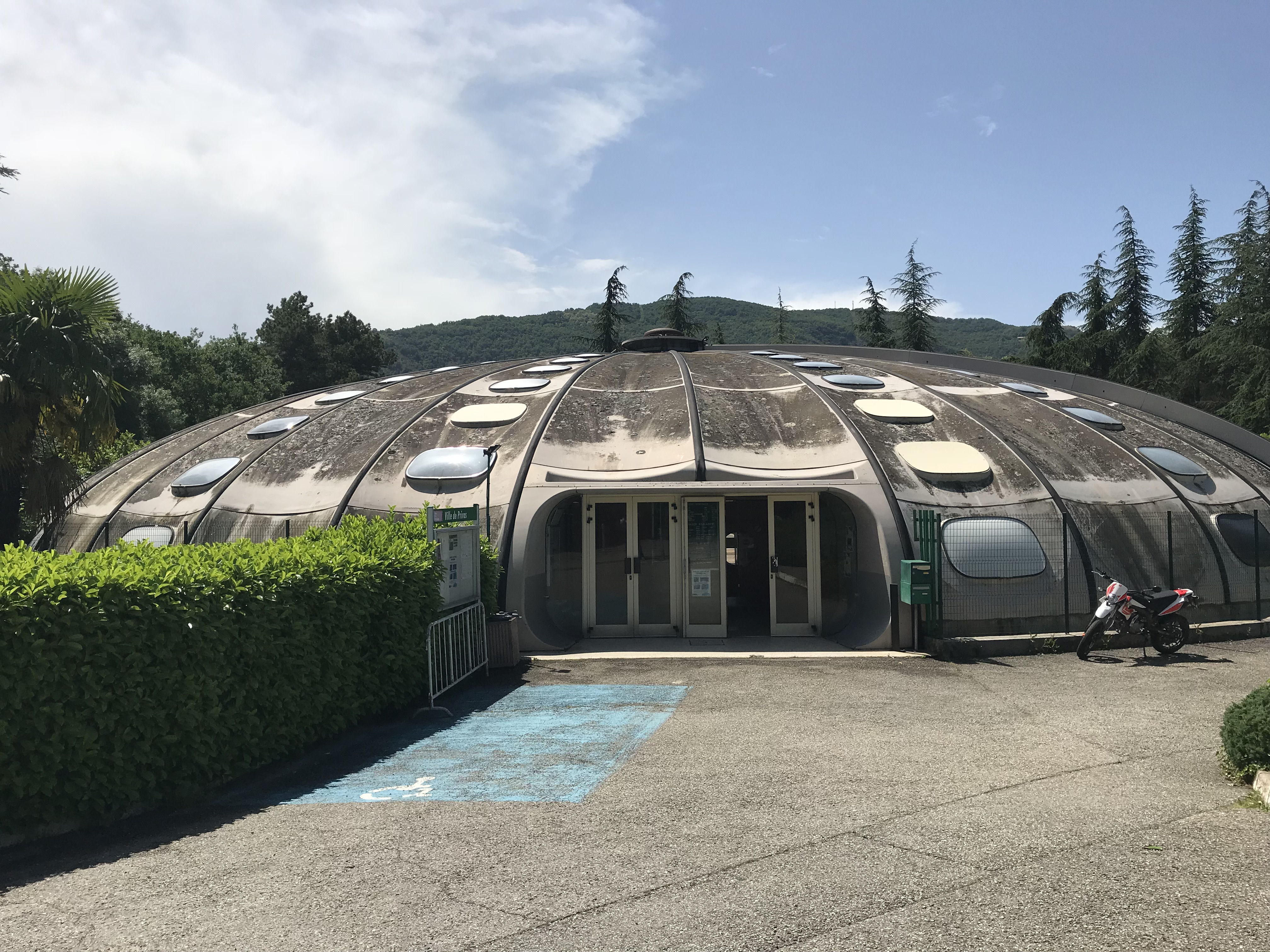 Image de Privas en Ardèche en France.